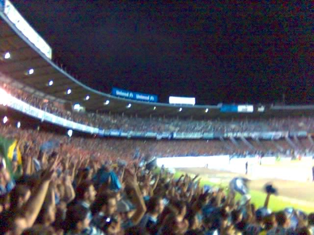 Uma foto minha no estádio olímpico casa do grêmio. Jogo de Grêmio X Cucutá pela Libertadores da América 2007